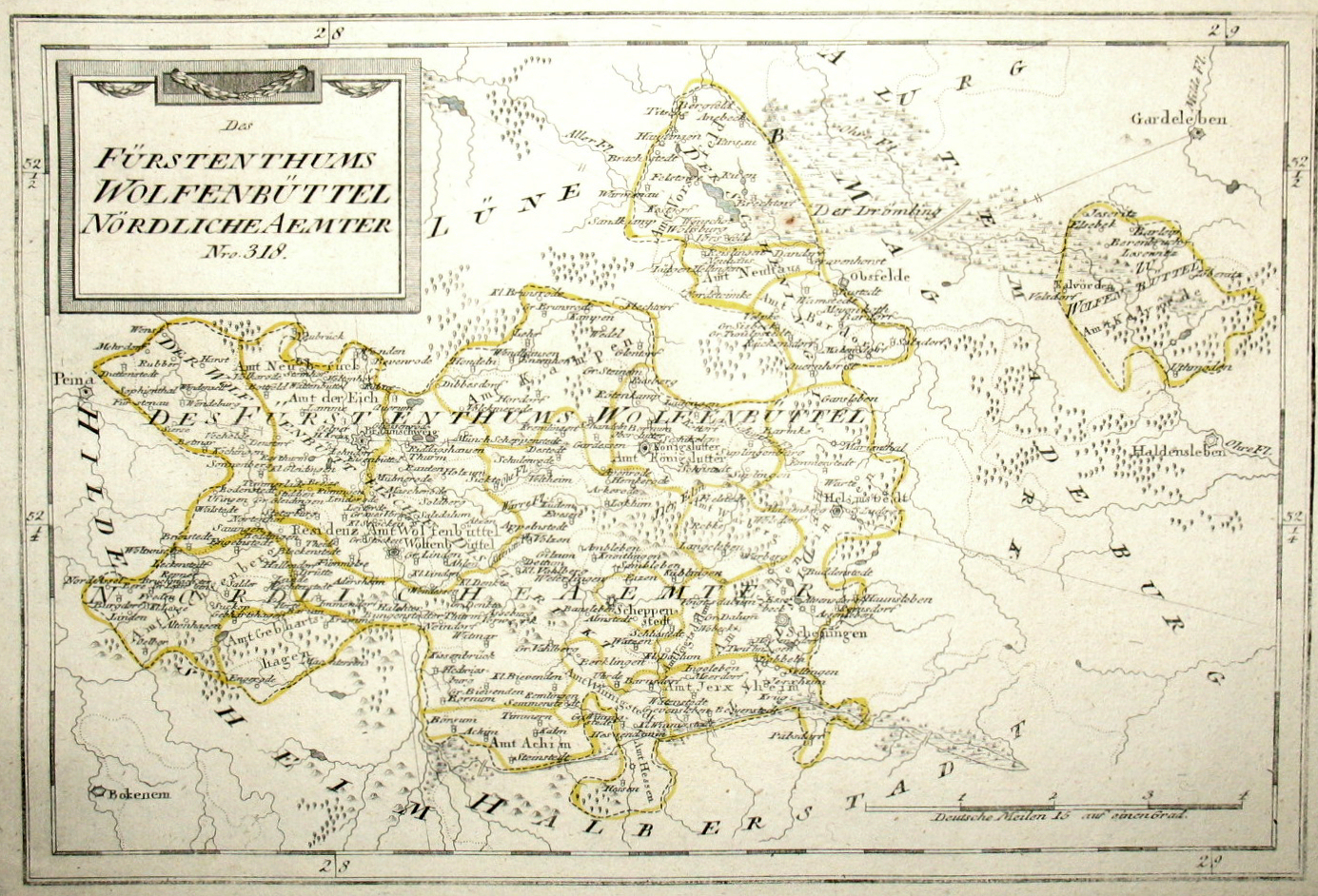 Des Fürstenthums Wolfenbüttel Nördliche Aemter. Nro. 318. Kolorierter Kupferstich